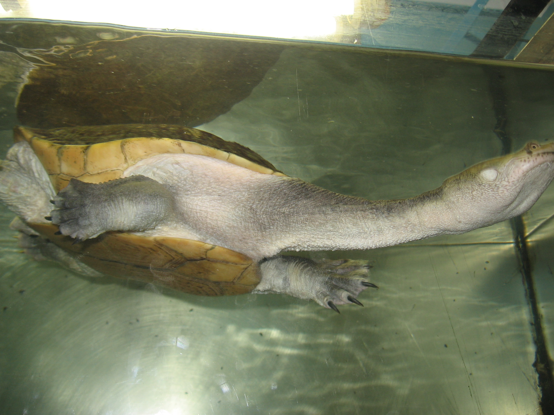 Новогвинейская Змеиношейная черепаха из Северского зоопарка. New Guinea Sneck Turtle From Seversk zoo.